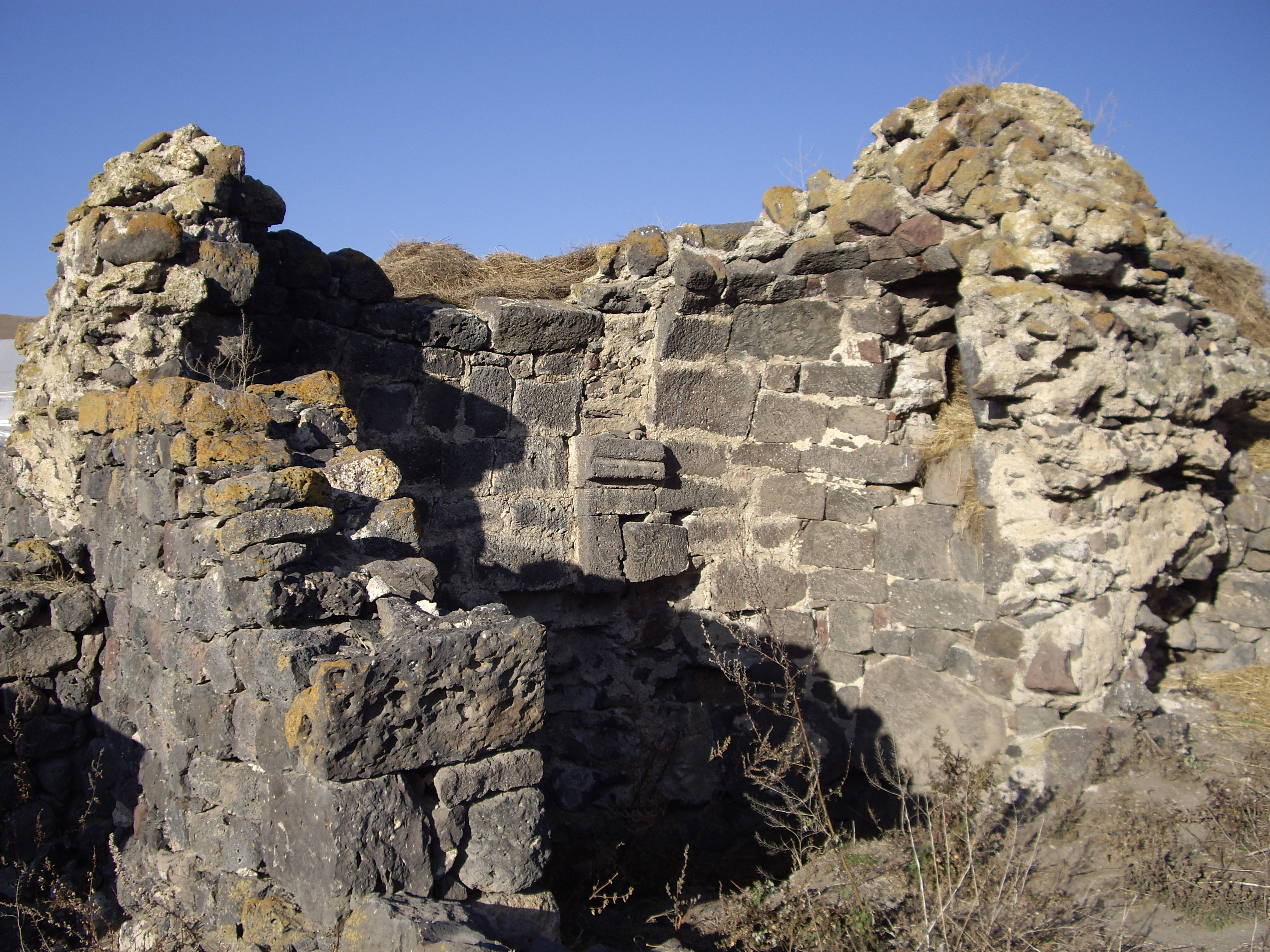 ჯავახეთის წყაროსთავის მცირე ეკლესია